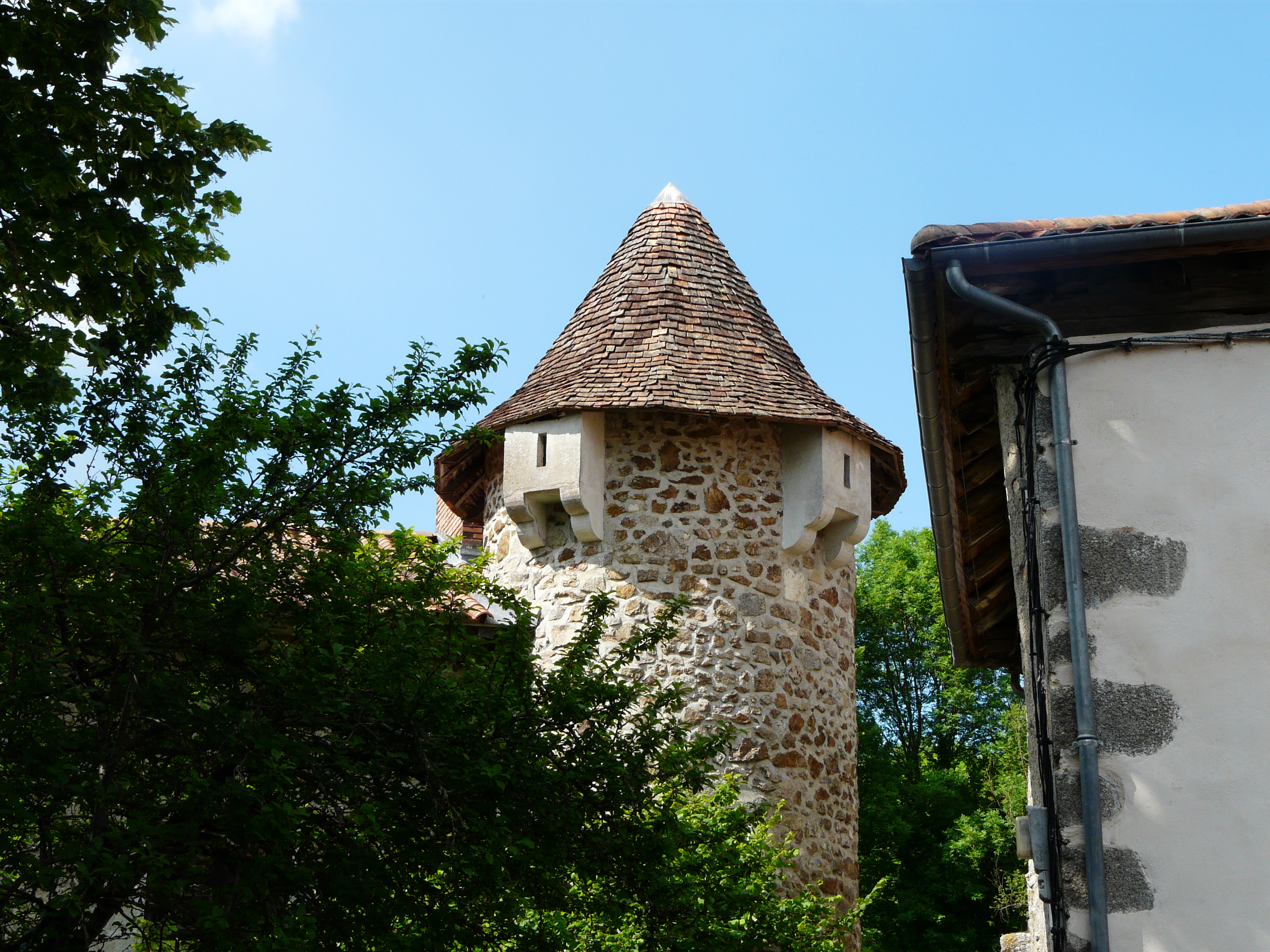 Une tour du château de Belleville dans le bourg de Bussière-Badil, Dordogne, France.